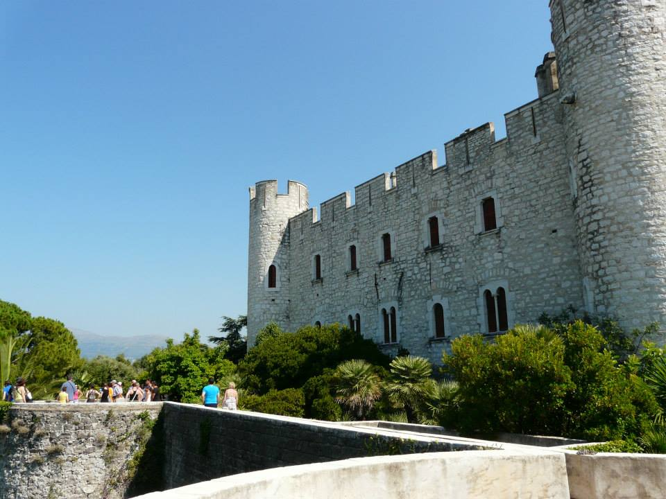 Visite de la forteresse médiévale